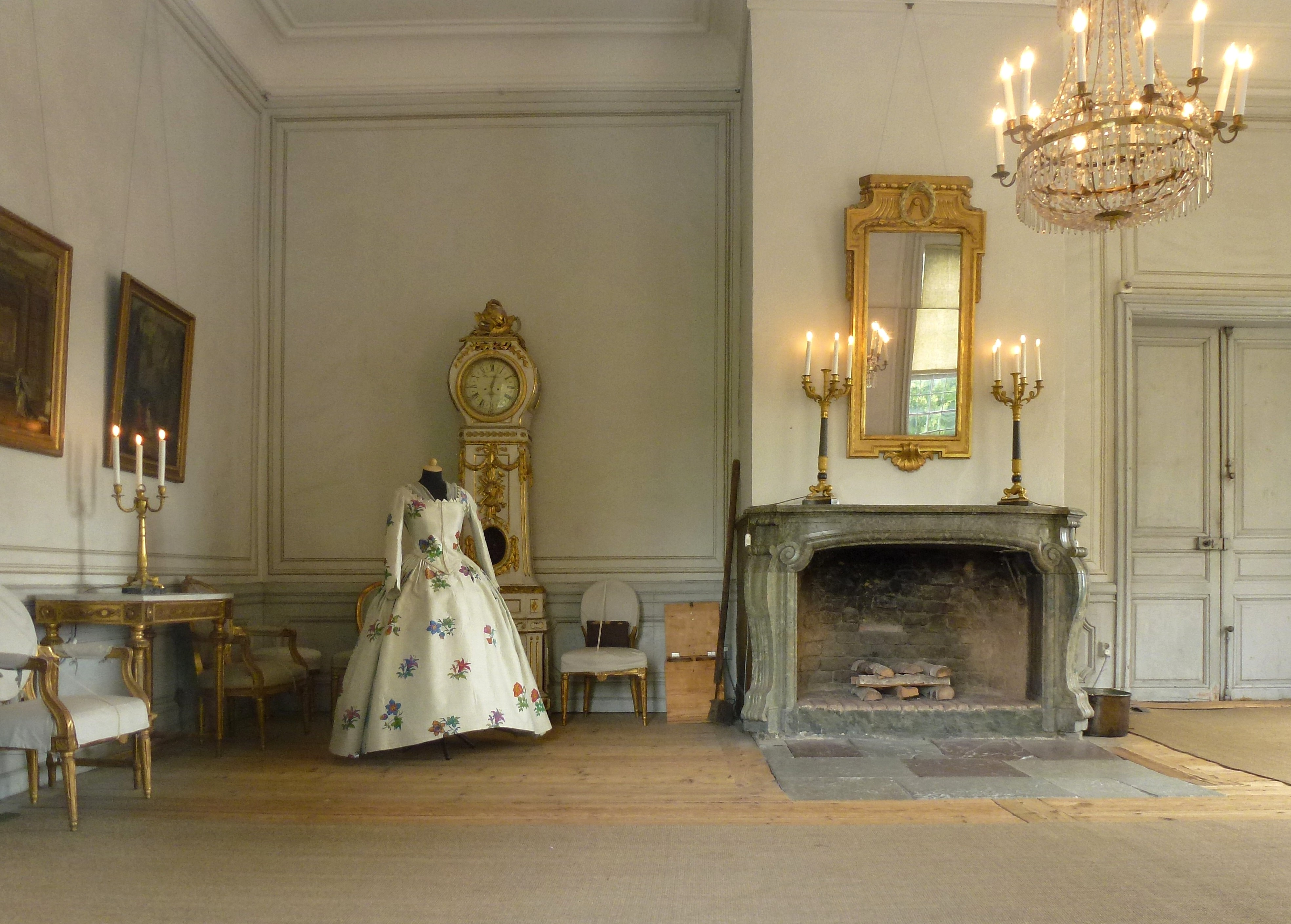 Drottningholms slottsteater salong